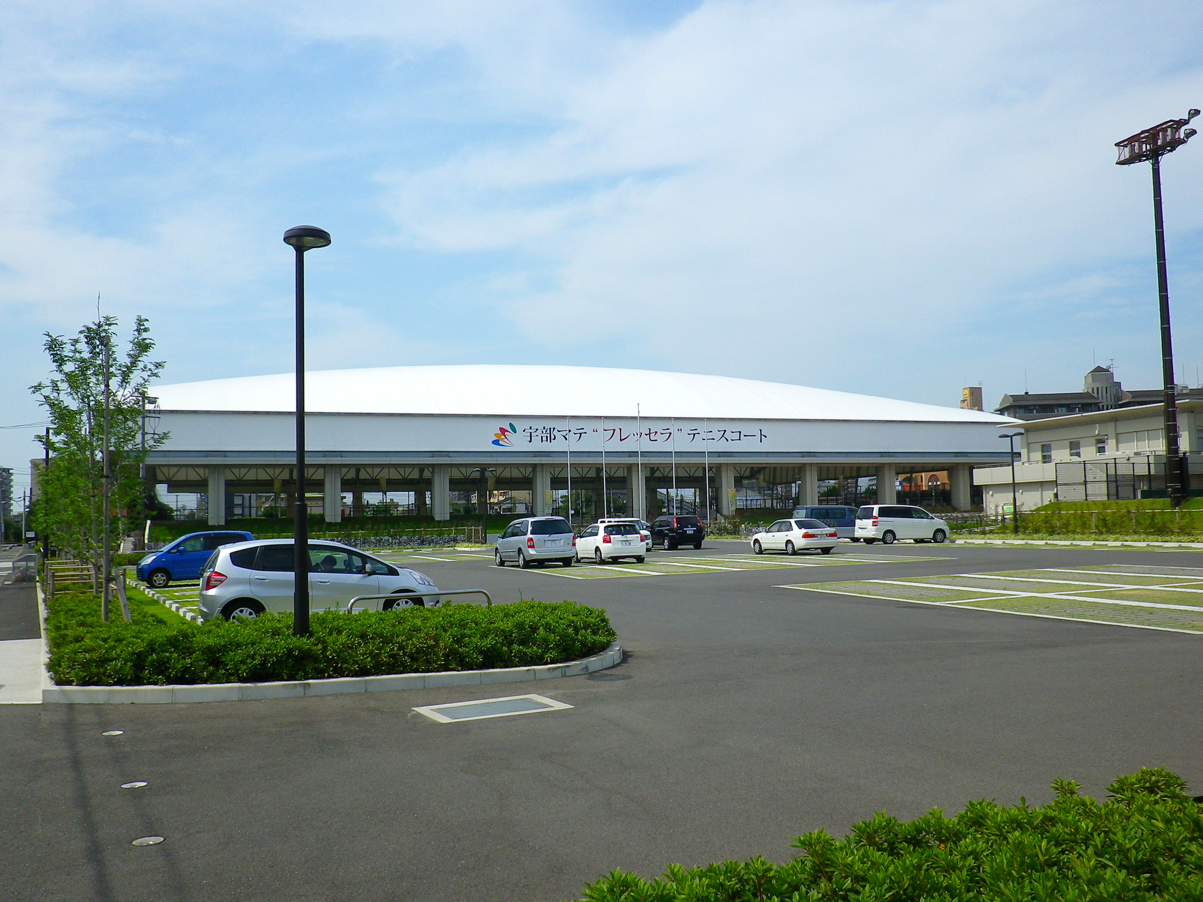 山口県宇部市。宇部マテ“フレッセラ”テニスコート（宇部市中央公園テニスコート）。